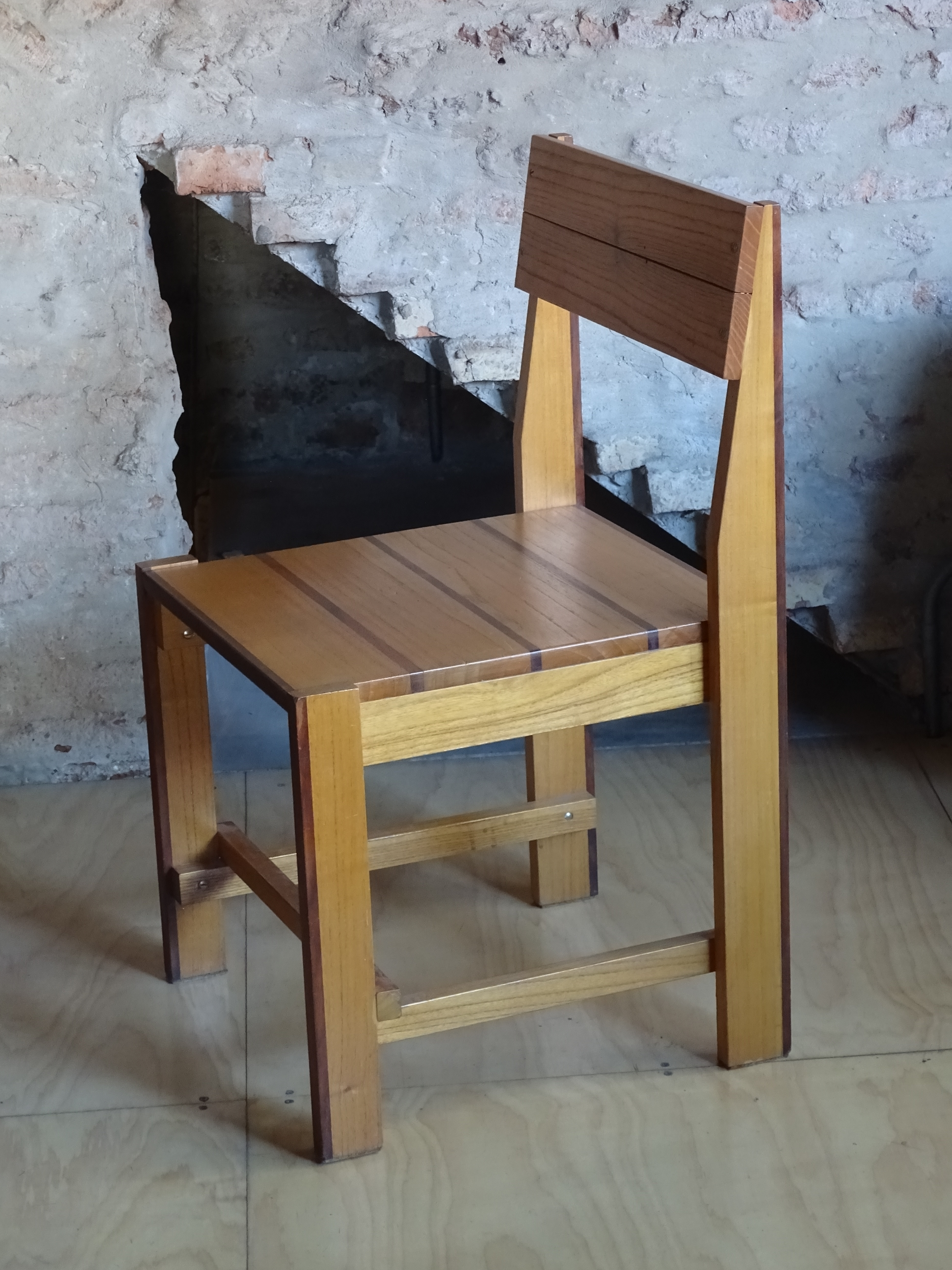 SenSilla. Diseño de Puppo